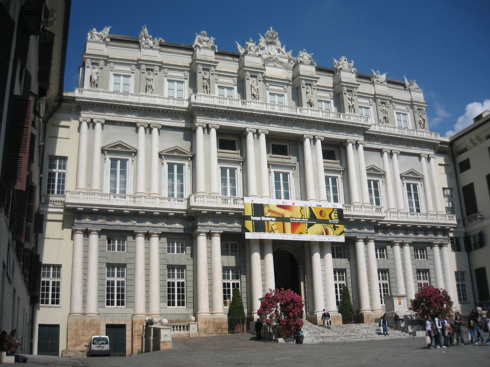 Genova, Palazzo Ducale in Piazza Matteotti